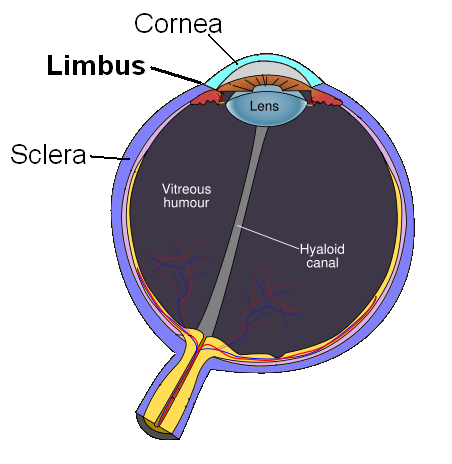 limbus